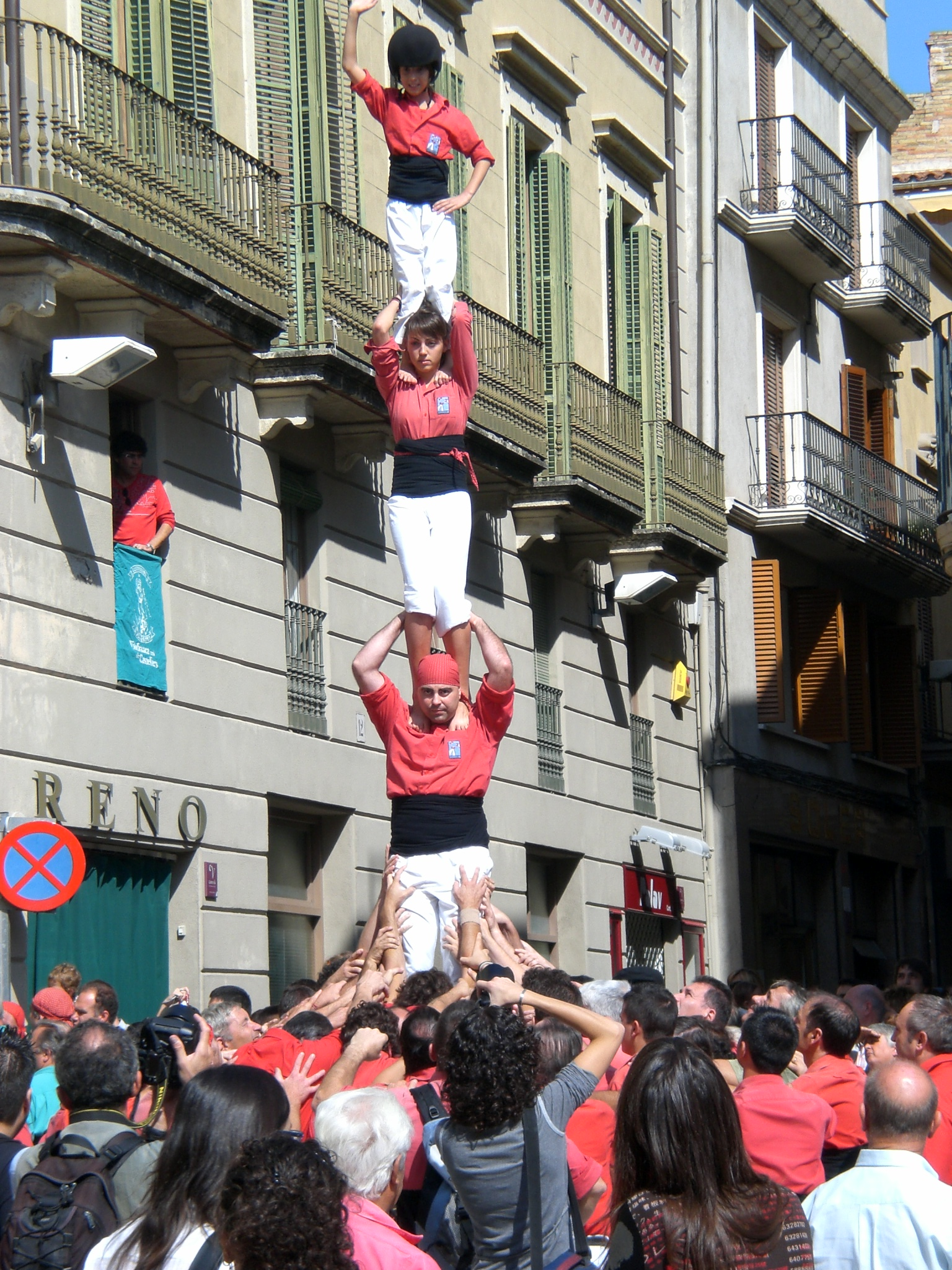 Pde4 der Nens del Vendrell wird auf den Platz getragen